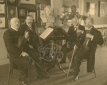 Bram-Elderin-Quartett